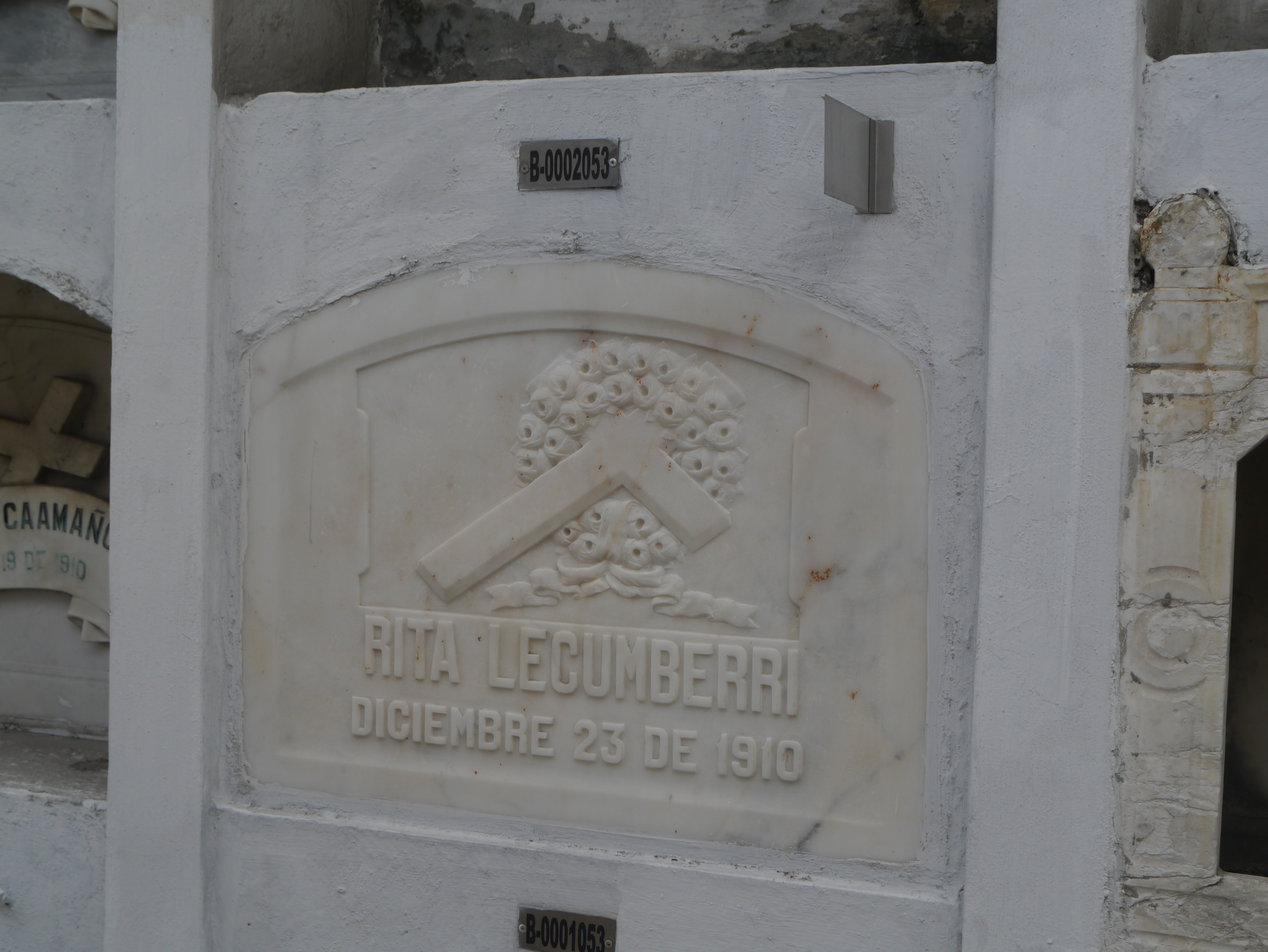 En el Cementerio General de Guayaquil